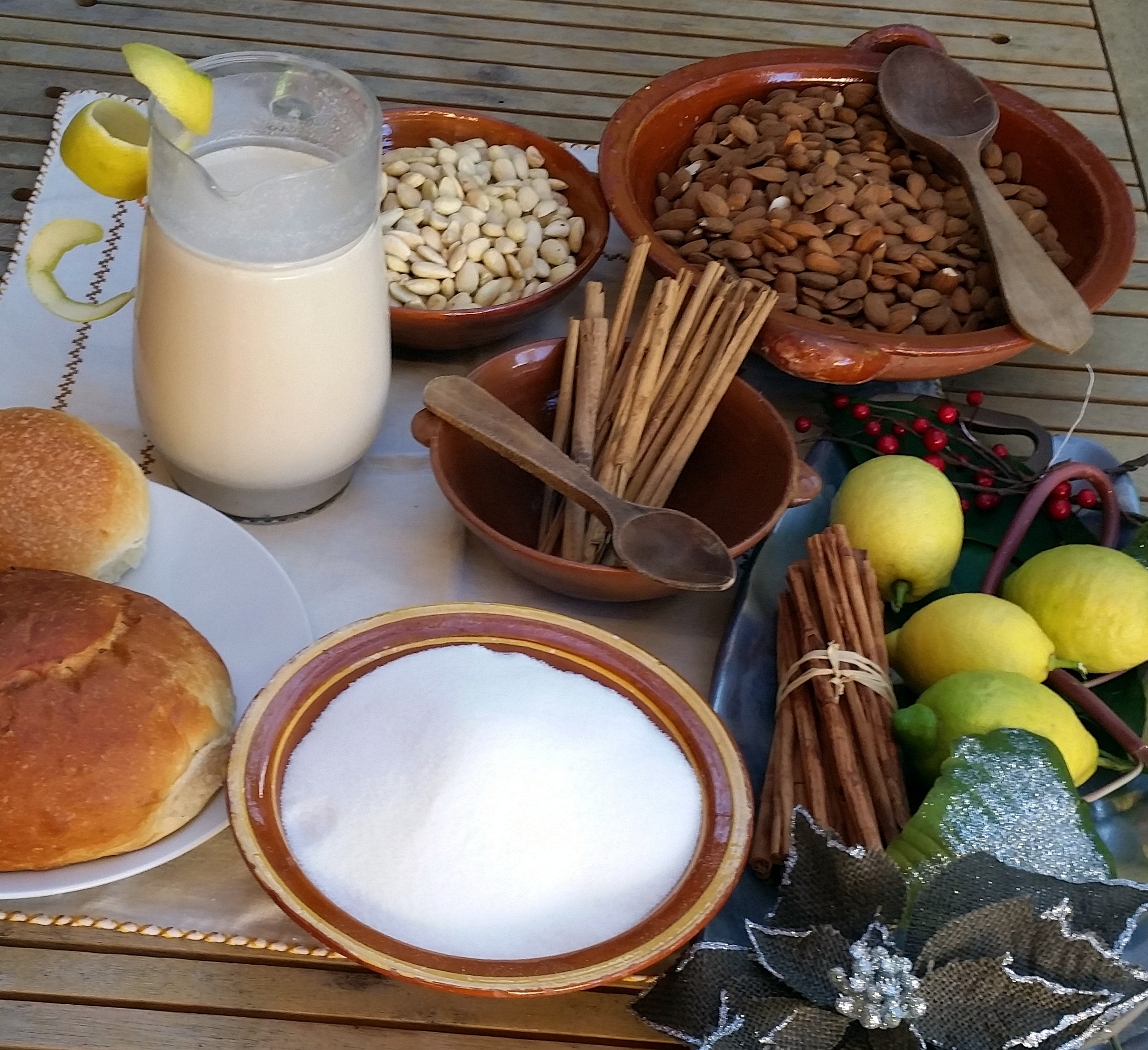 Llet d'ametla